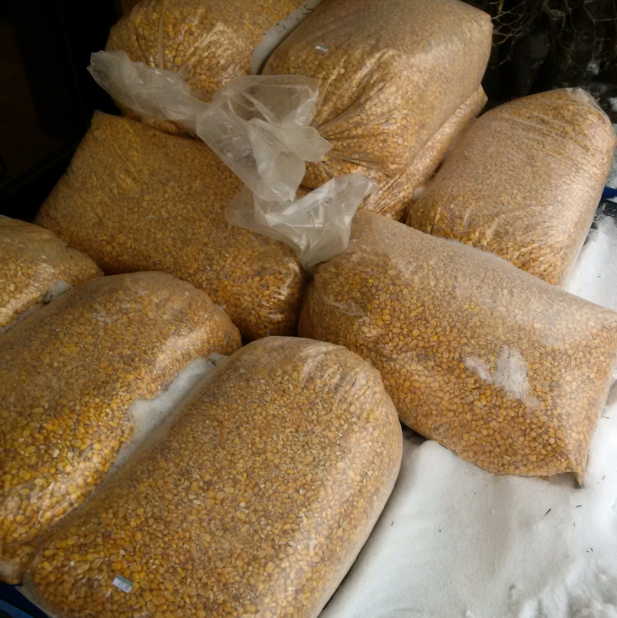 Ce maîs est destiné à attirer le chevreuil pour la chasse.